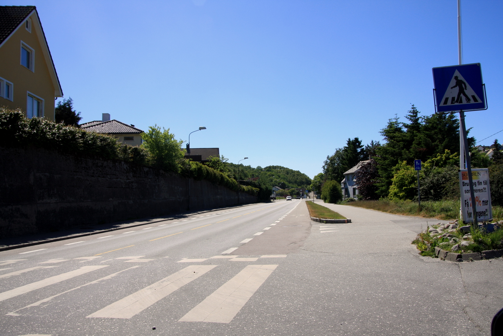 Fylkesvei 332 Skippergaten